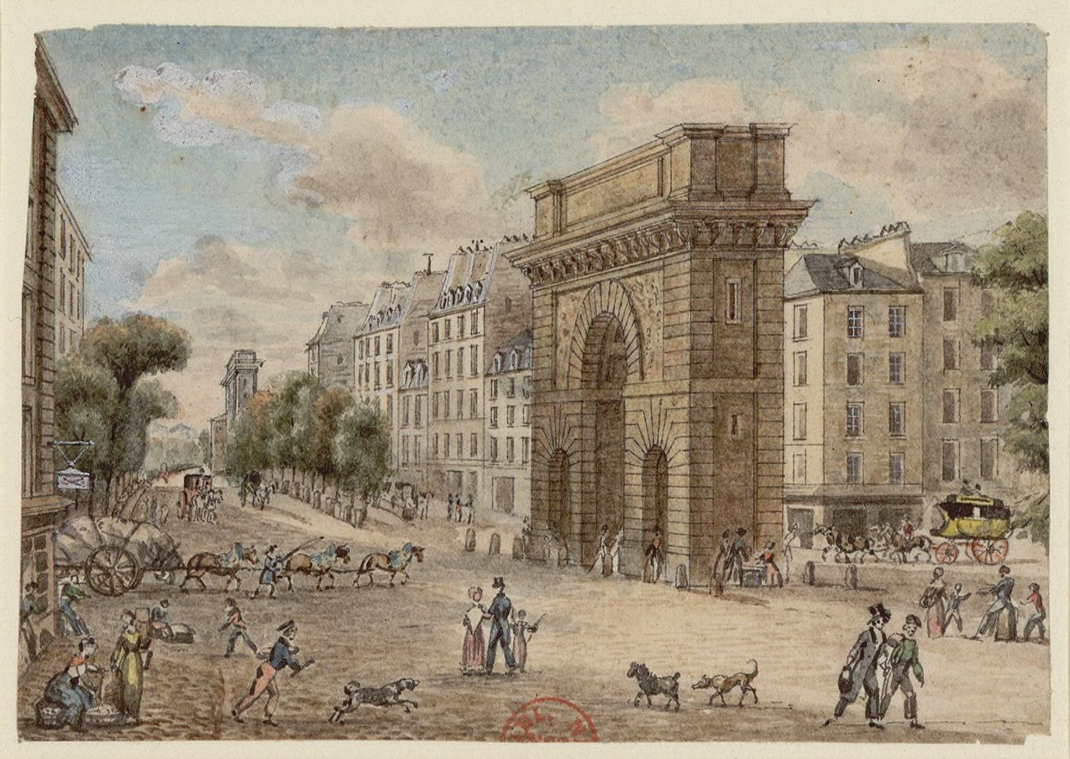 La porte et le boulevard Saint-Martin, Paris, Xe arrondissement. Plume, encre de Chine et aquarelle par Christophe Civeton (1796-1831).